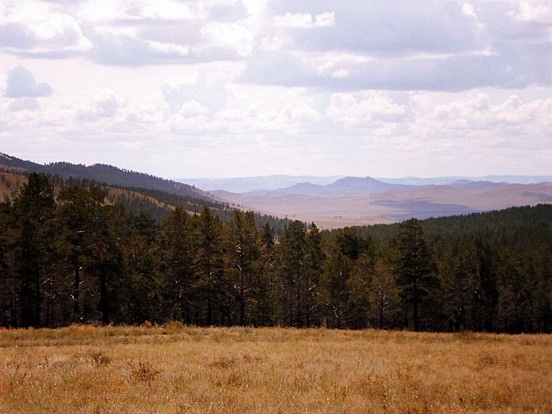 Вид на юг с горы Убиенной.